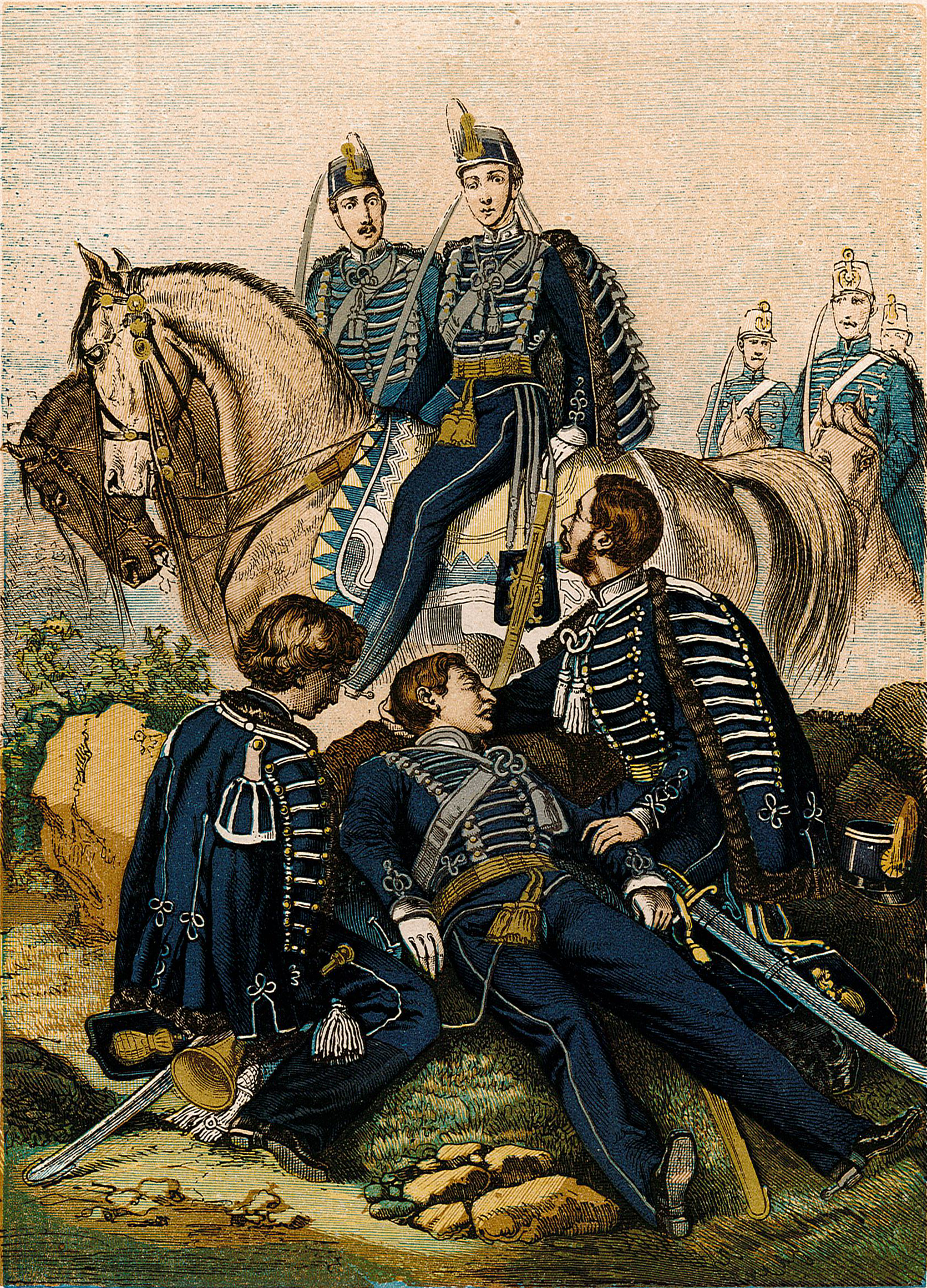 Uniformer för ”Kongl. Lif-Regementets Husar-Corps.”